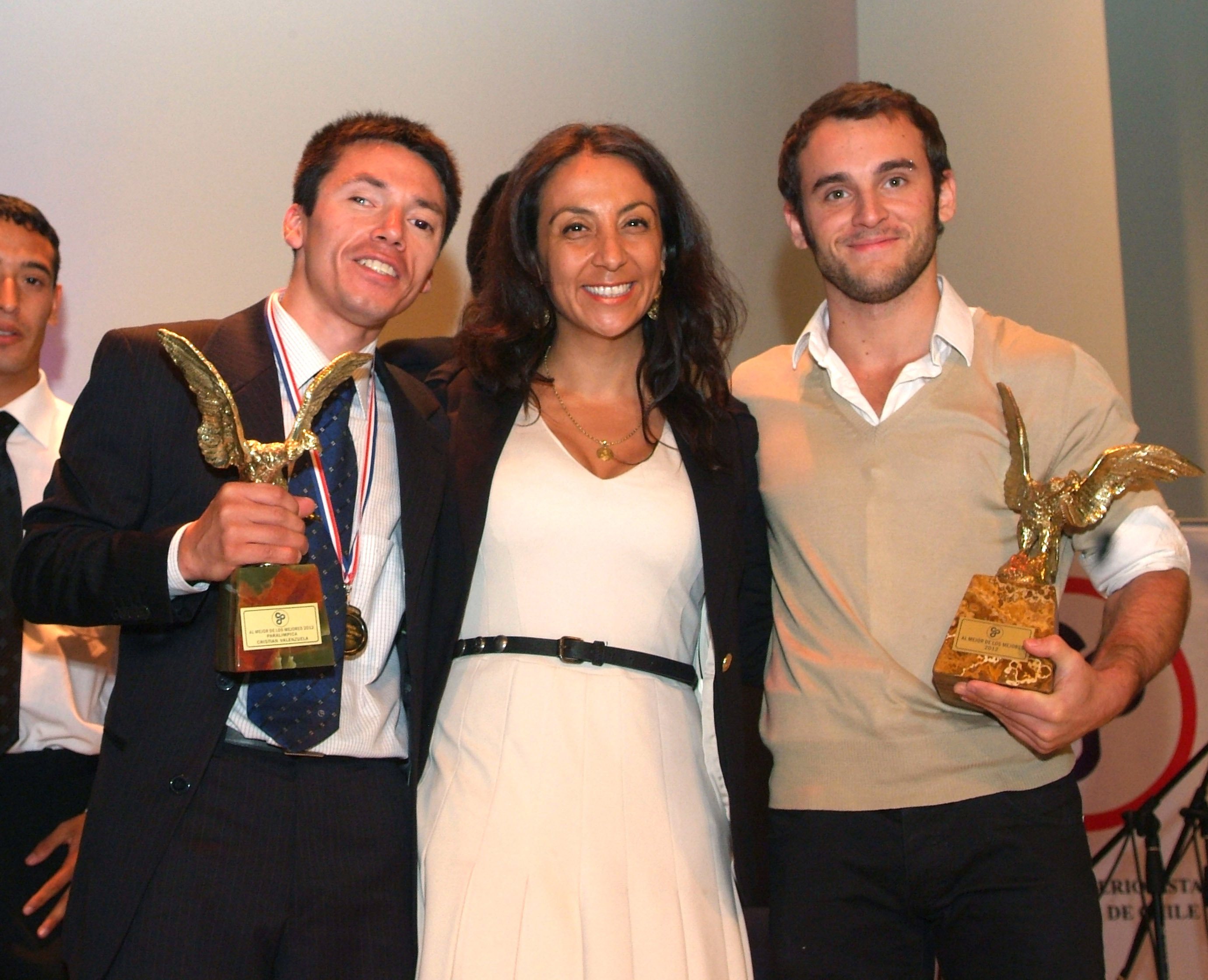 El atleta paralímpico Cristián Valenzuela, la ministra Cecilia Pérez, y el gimnasta Tomás González.